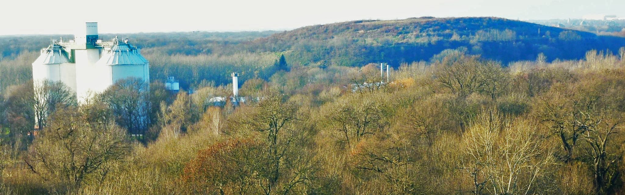 KWL-Kläranlage und Nahleberg (im Hintergrund) vom Turm auf dem Rosentalhügel aus gesehen